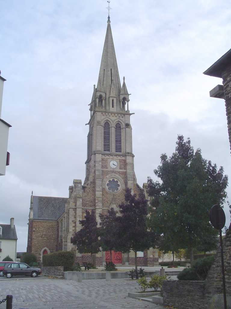 église de Goven (France,35)